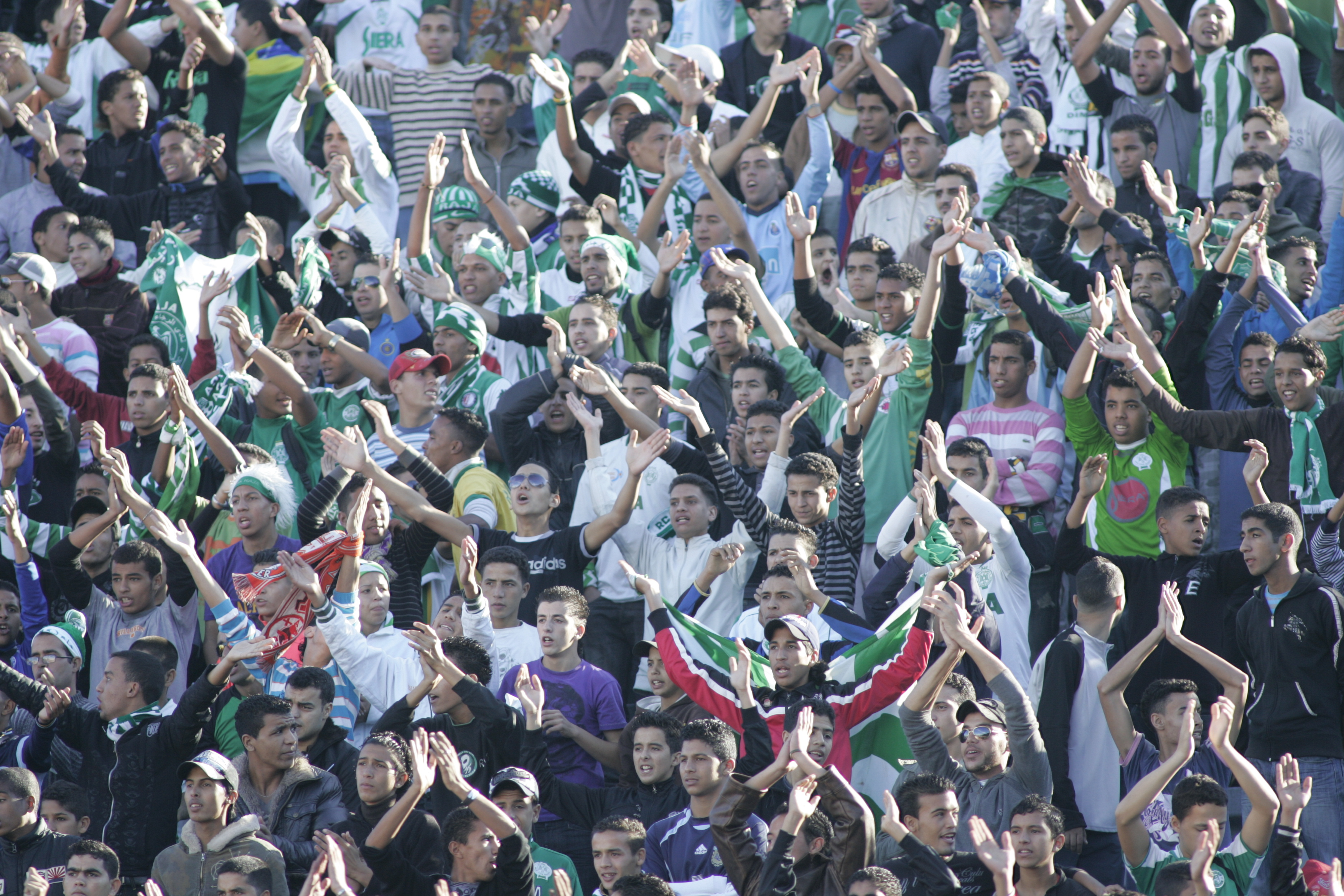 Supporters du Raja de Casablanca